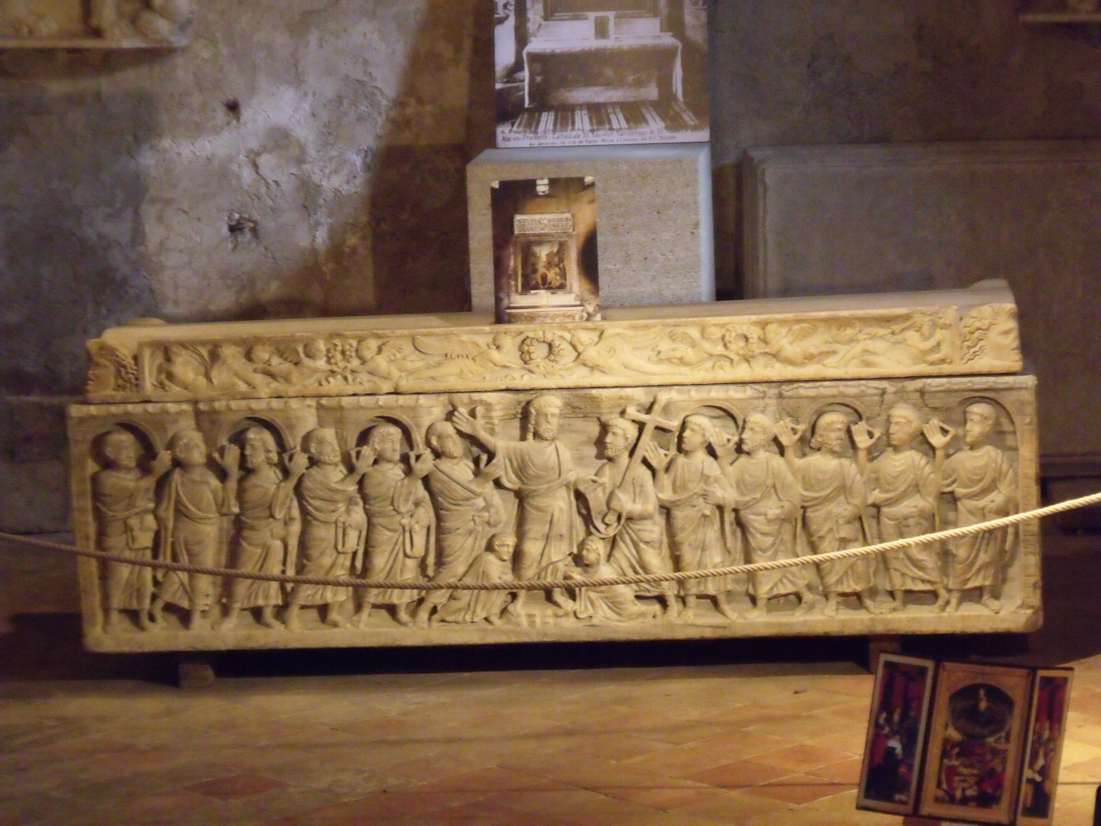 Sarcophage chrétien Aquae Sextiae, cathédrale Saint-Sauveur, Aix-en-Provence.